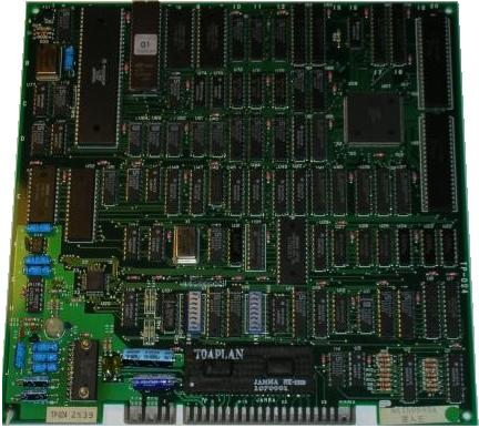 Truxton 2 arcade PCB